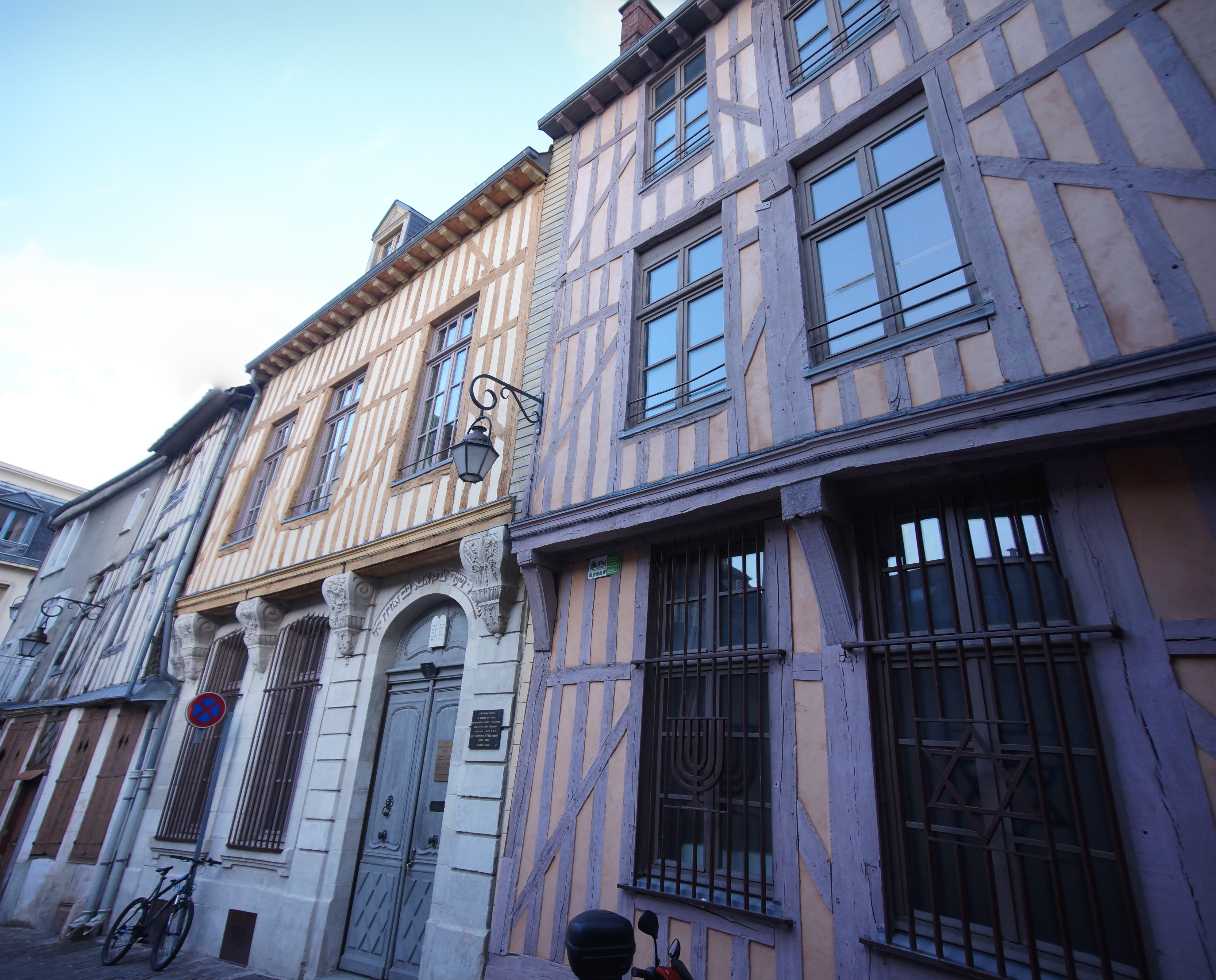 La Synagogue de Troyes, dans l'Aube